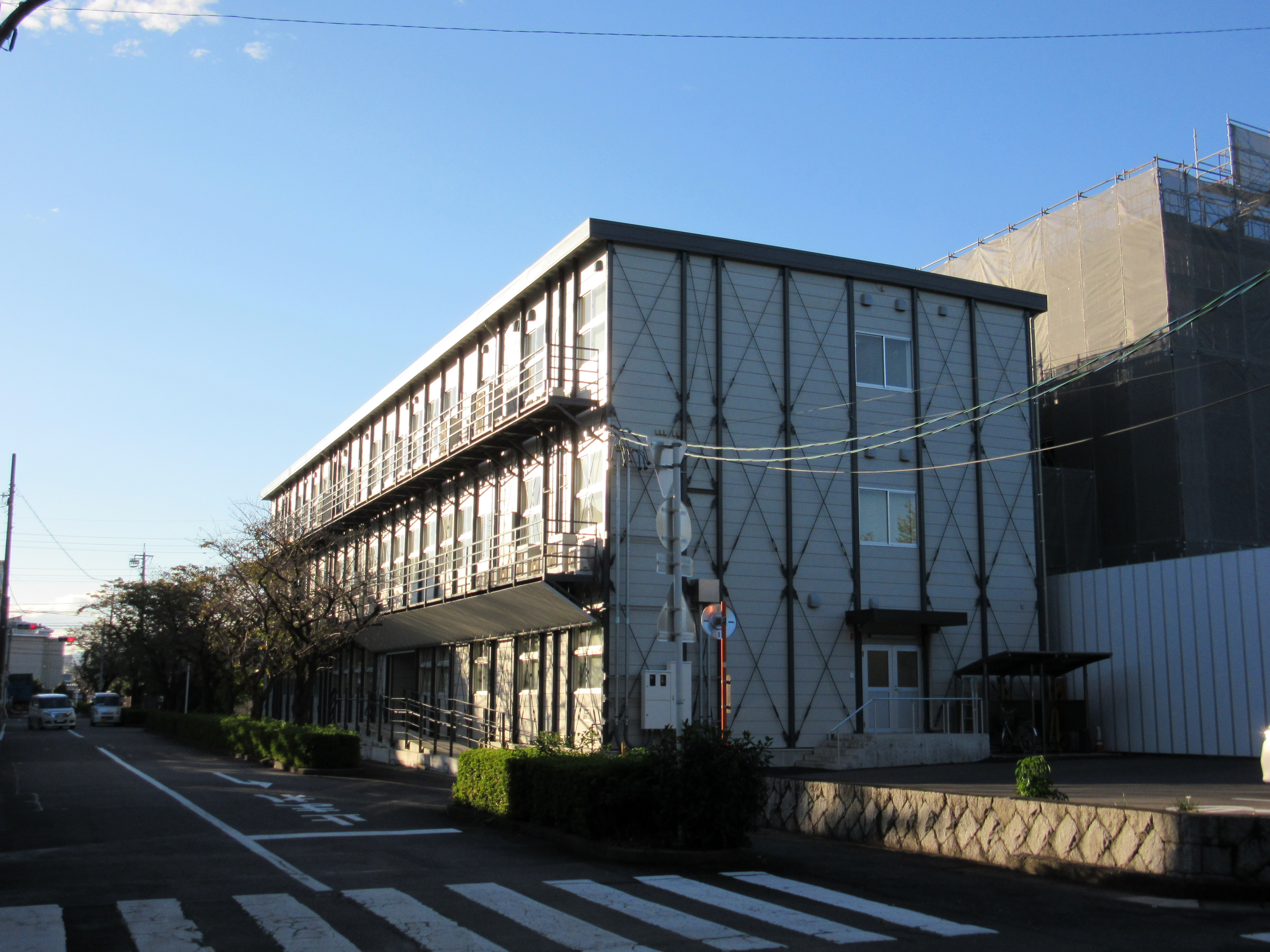 大垣簡易裁判所